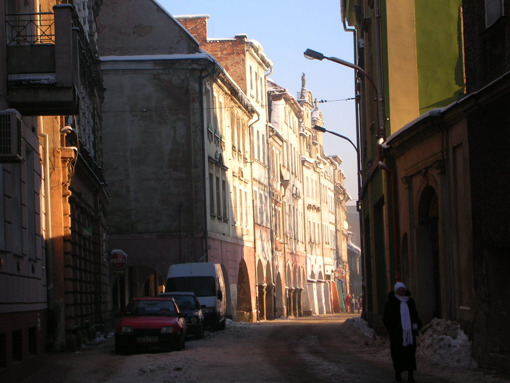 Kamienna Góra, ul. A. Mickiewicza - stara część miasta Autor - Bartek Wawraszko